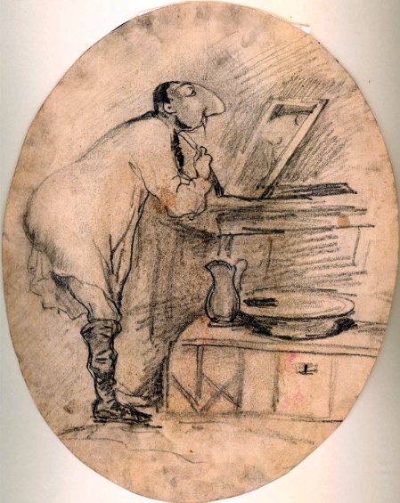 Toaleta lui Nas Arabescu, Autor:NicolaeGrigorescu. Datare:nedatat. Titlul:“Toaleta lui Nas Arabescu” (N.Basarabescu)–caricatură. Tehnica:creion pe hârtie. Dimensiuni:193x152mm(oval). Semnătura:nesemnat. Provenienţa:Col. Bernath, Col. E. Dragomirescu, Biblioteca Academiei Române, inv.9102. Bibliografie:Virgil Cioflec – Grigorescu, Cultura Naţională,1925; Acad. G. Oprescu – N. Grigorescu, Edit. Meridiane, Buc, 1962, vol.2, p.82, il.94; Barbu Brezianu, Radu Ionescu şi Cătălina Macovei – Nicolae Grigorescu, CD-ROM, Noi MediaPrint, Bucureşti, 1998